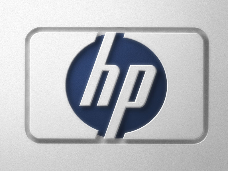 Foto tirada de uma Plotter 1,5 metros em Abril de 2010